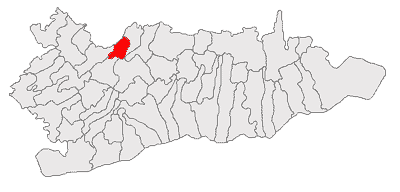 Categorie:Hărţi ale judeţului Călăraşi